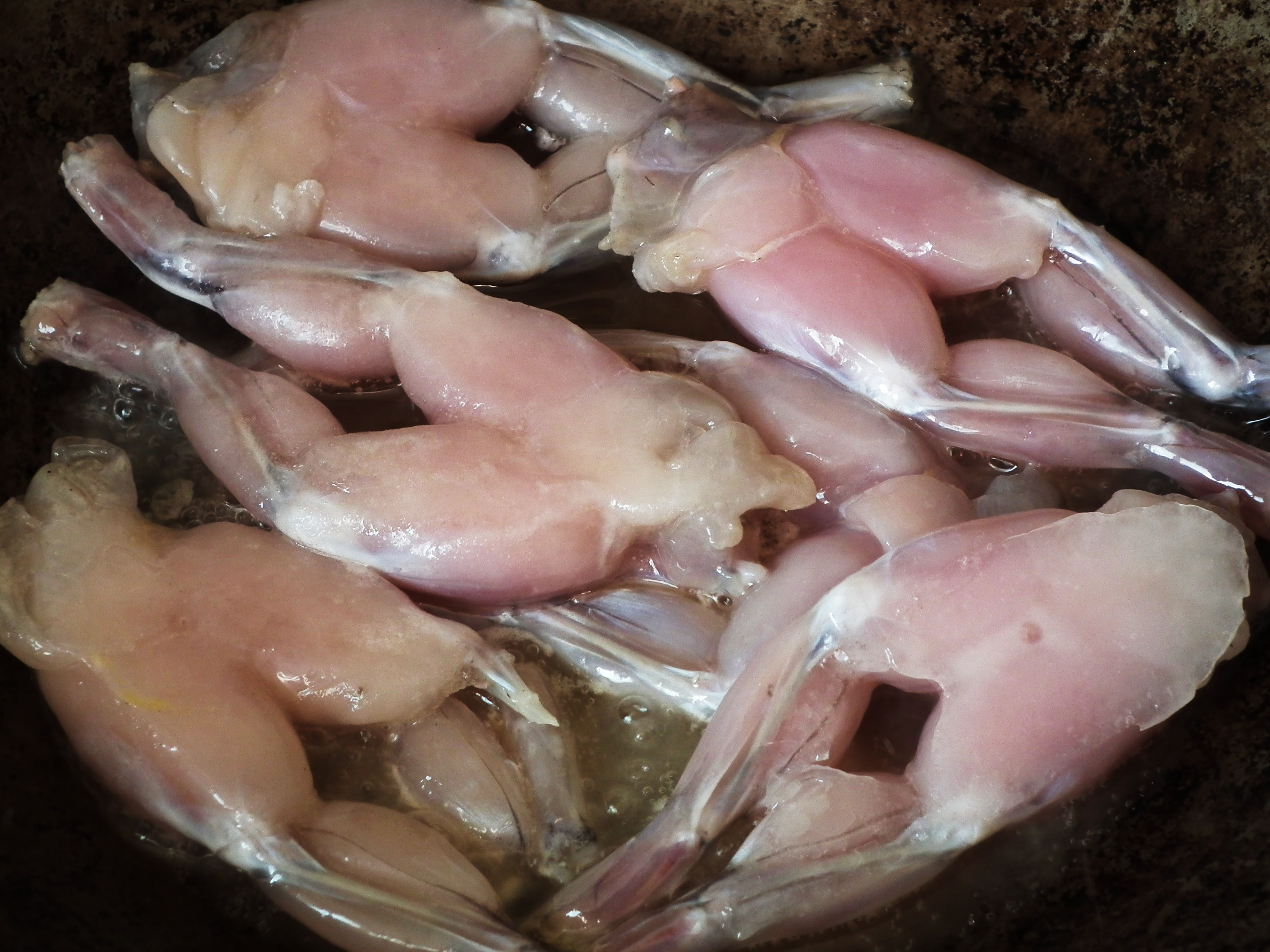 Żabie udka w woku.